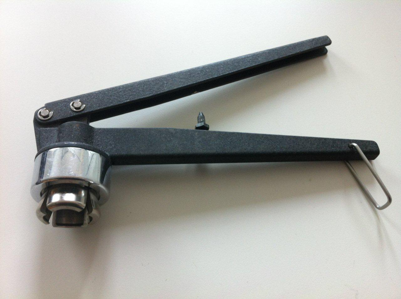 Zange zum Verschließen von Flaschen